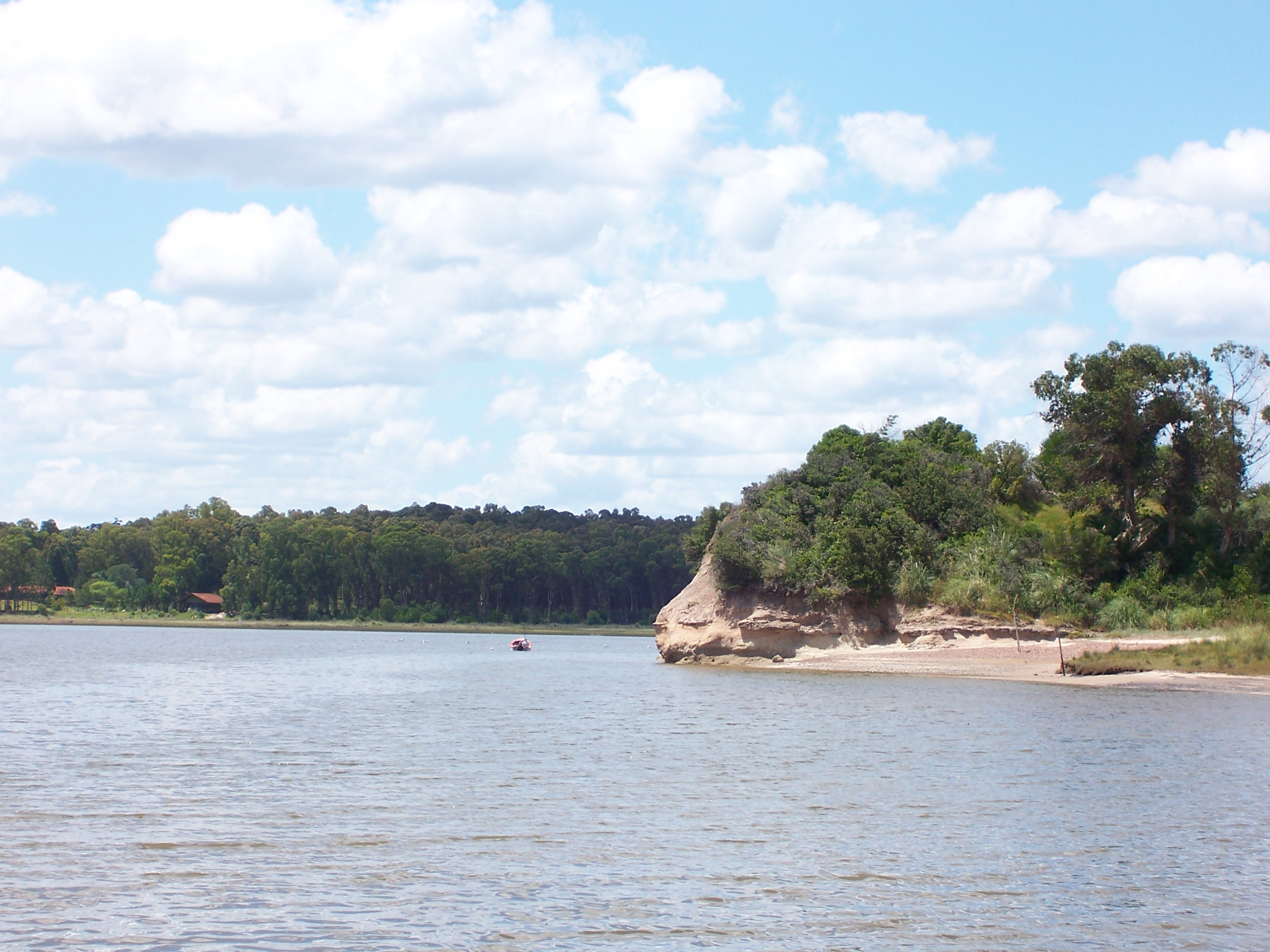 Vista aguas arriba del Arroyo Solís Grande, también denominado Río Solís, desde su desembucadura en el Río de la Plata.